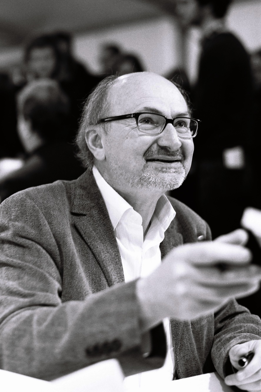 Éric Fottorino au salon du livre Radio France, 26 novembre 2011